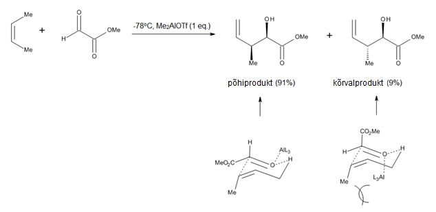 Toolisarnane üleminekuolek pakutud Lewise-happega katalüüsitud een-reaktsioonide jaoks